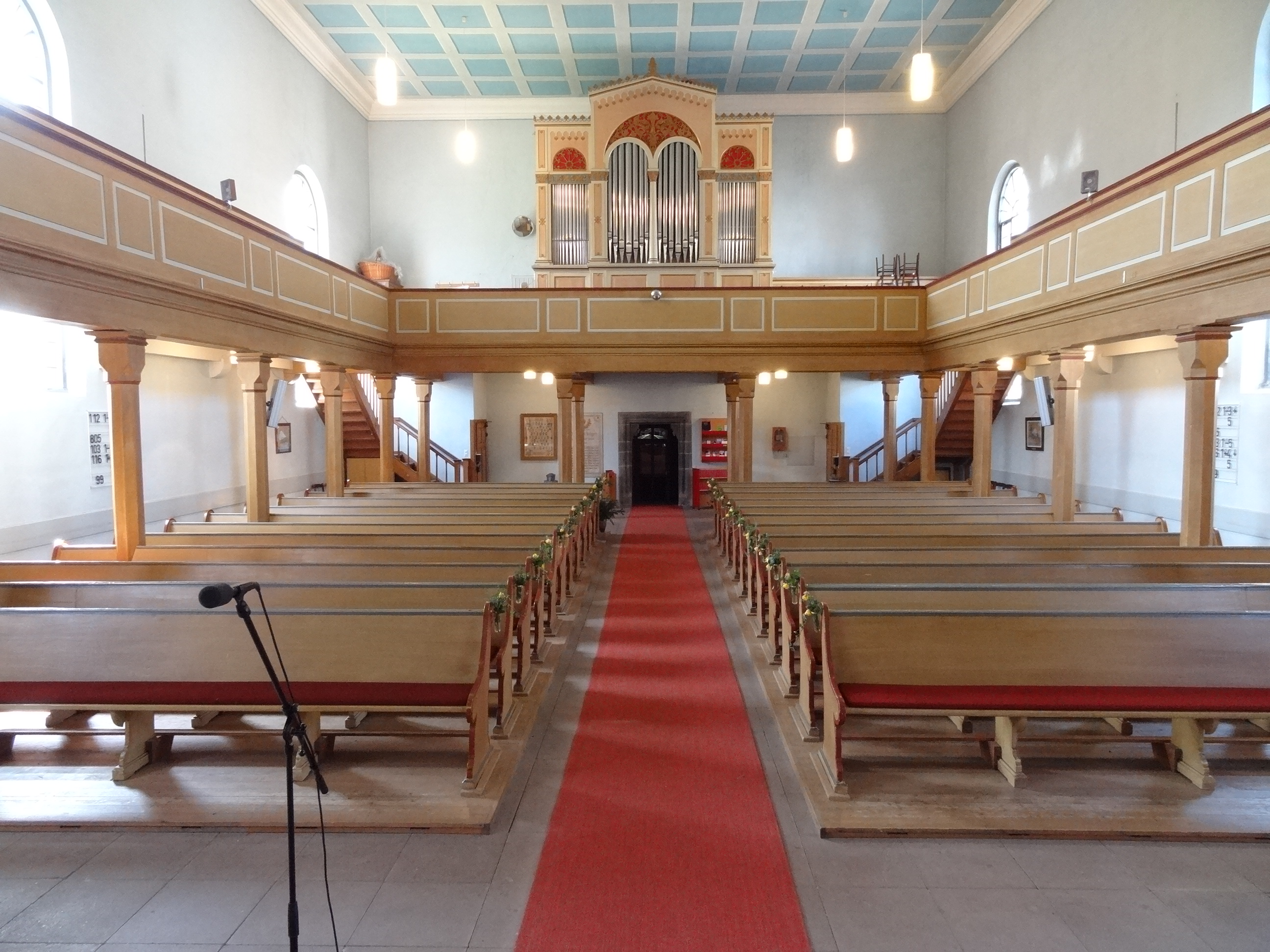 Evangelische Kirche Beuern